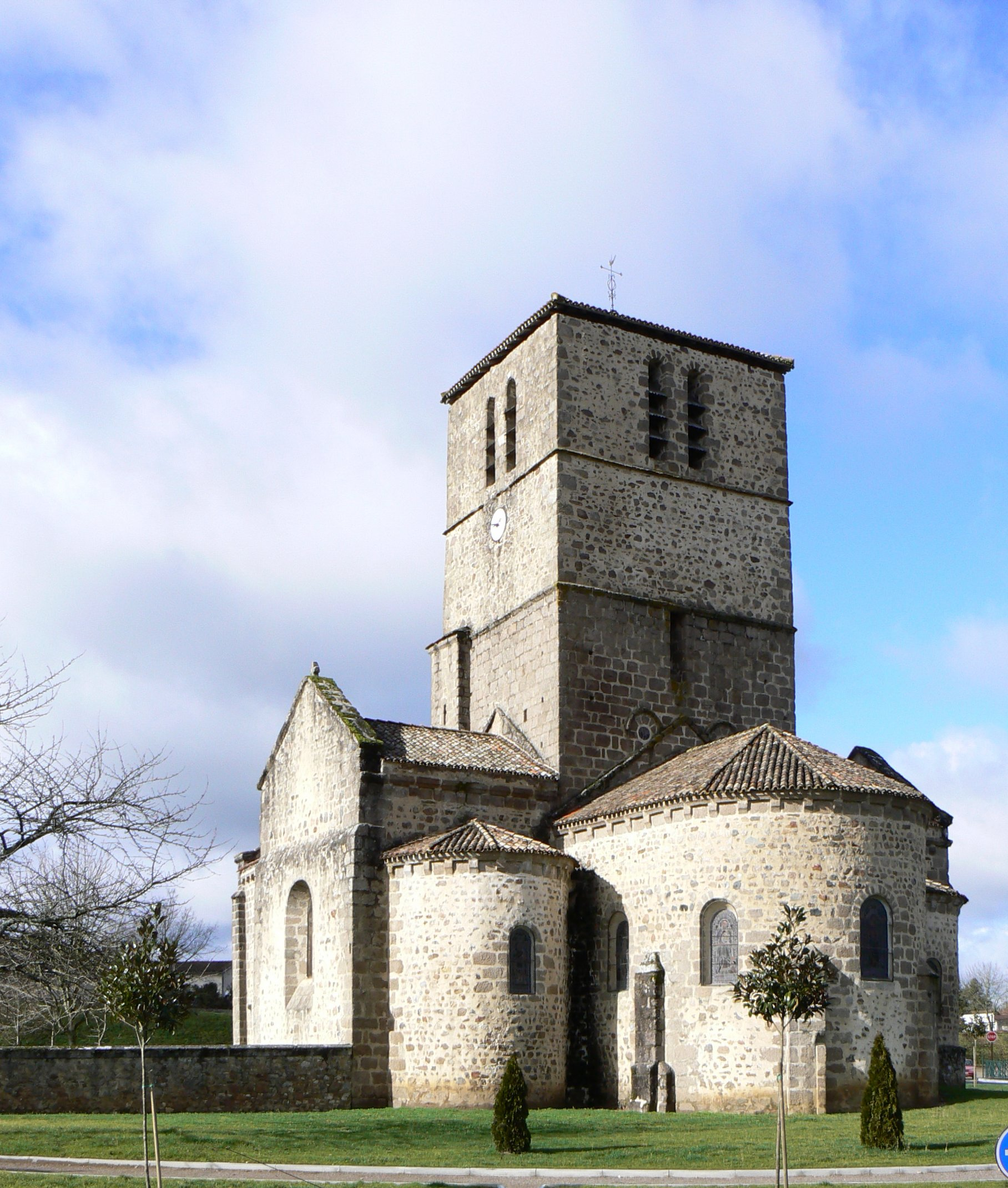 Église Saint Barthélemy de Confolens, Charente, France.